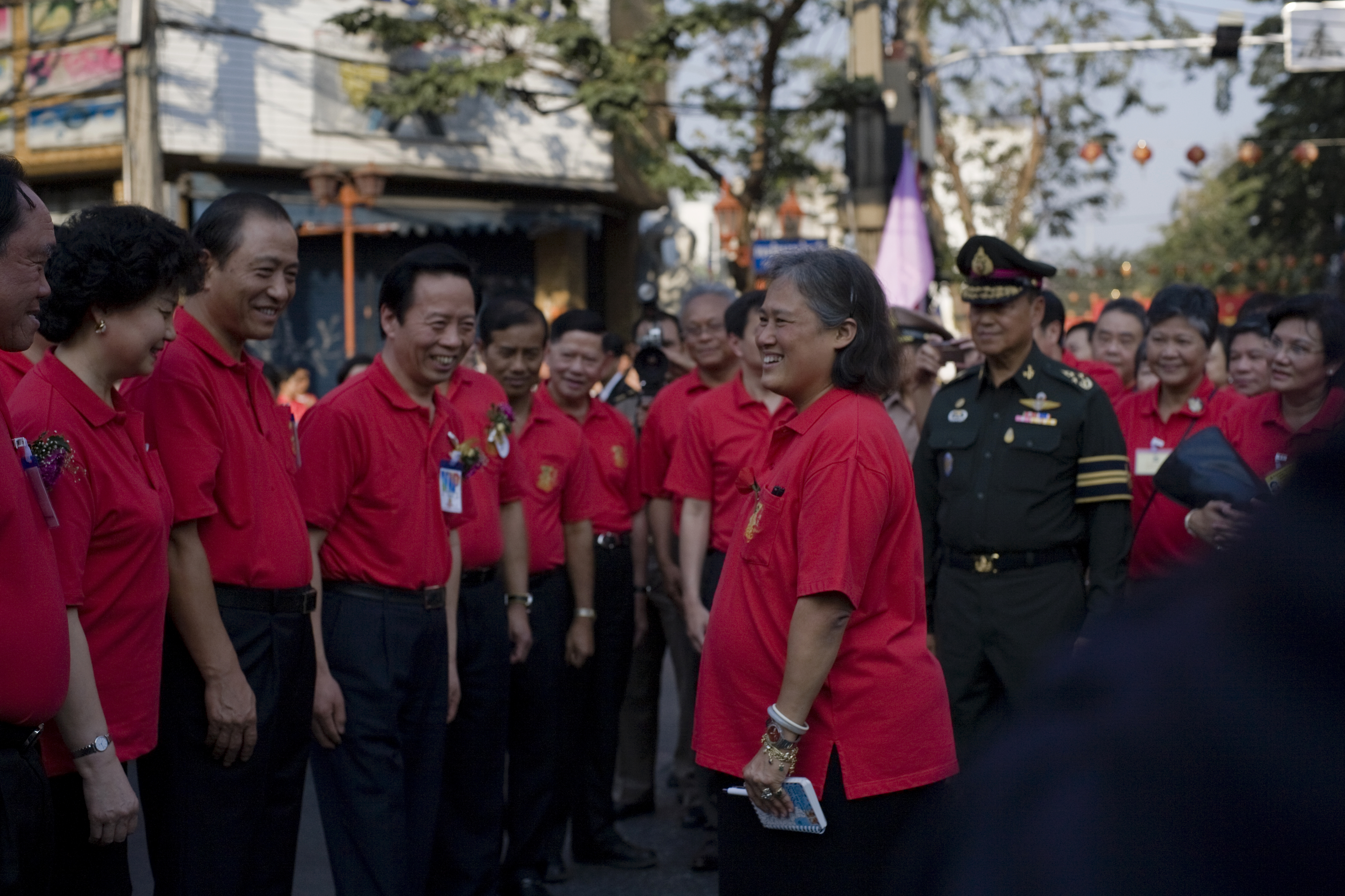 นายกรัฐมนตรีเข้าเฝ้าฯ รับเสด็จฯ สมเด็จพระเทพรัตนราชสุดาฯ สยามบรมราชกุมารี และรับพระราชทานของที่ระลึก ณ ซุ้มประตูเฉลิมพระเกียรติ 6 รอบพระชนมพรรษา ถ.เยาวราช วันพฤหัสบดี ที่ 3 กุมภาพันธ์ พ.ศ.2554 (Photographer attached to the Prime Minister of the Kingdom of Thailand (H.E.Mr.Abhisit Vejjajiva) : Peerapat Wimolrungkarat / พีรพัฒน์ วิมลรังครัตน์) @is50mm